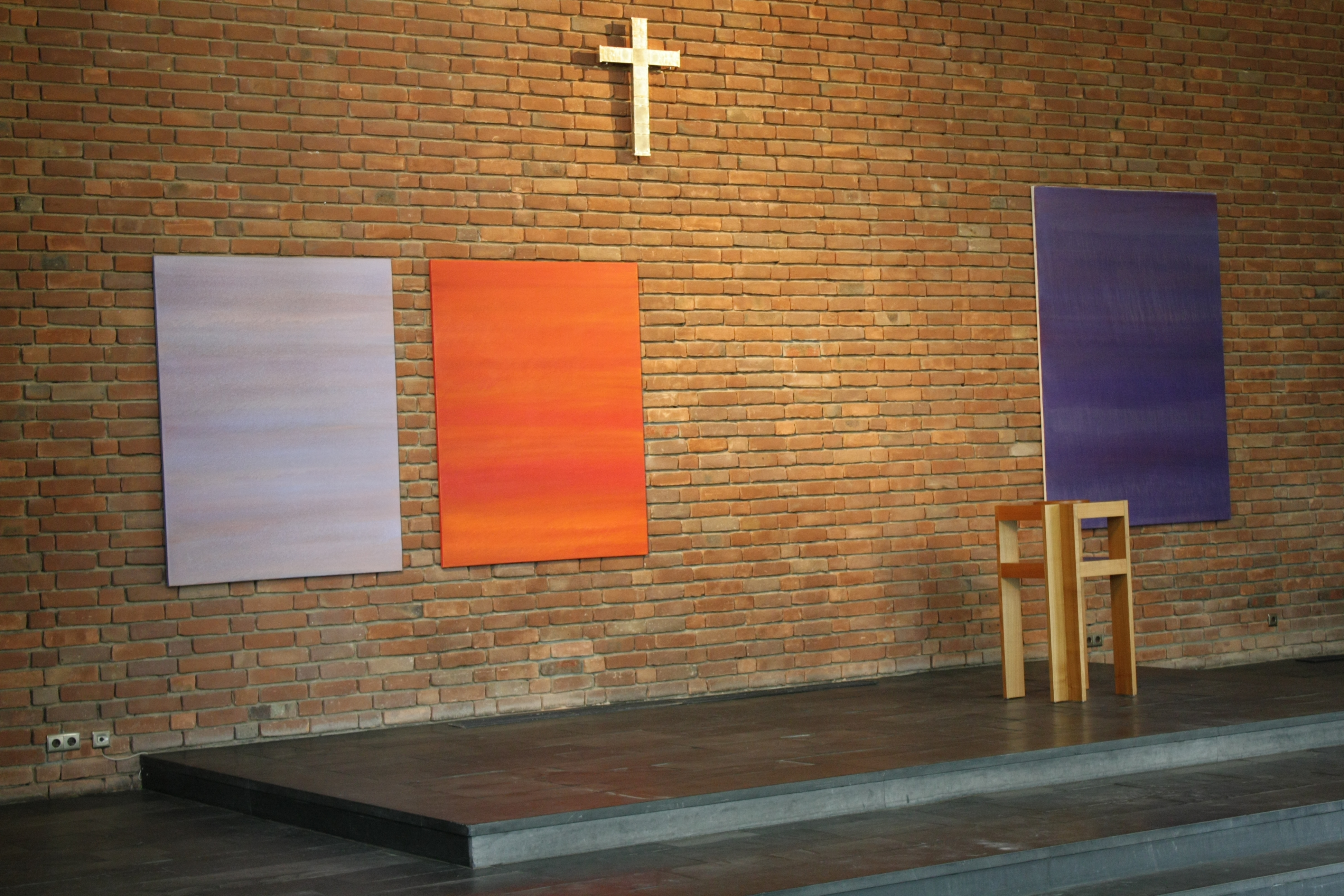 Bild von sabine Odensass in der Trinitatis-Kirche in Bonn